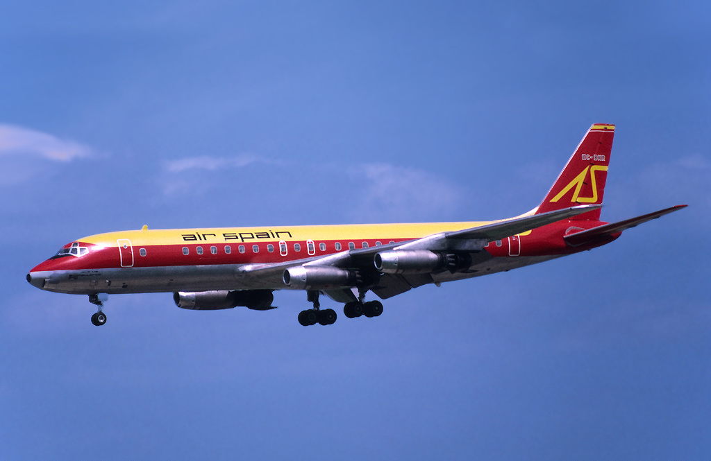 EC-BXR (cn 45422/34) Air Spain sticks in my memory for two good reasons, one that they flew Britannias, the other that they had this striking colour scheme. This early DC-8 began life in 1.60 with Eastern as N8601 and was one of six acquired from them by Air Spain from 1.71. After merger talks with Aviaco broke down, the airline ceased operations in 1.75 and this aircraft was scrapped by AJI at Van Nuys in 1977 as N48CA